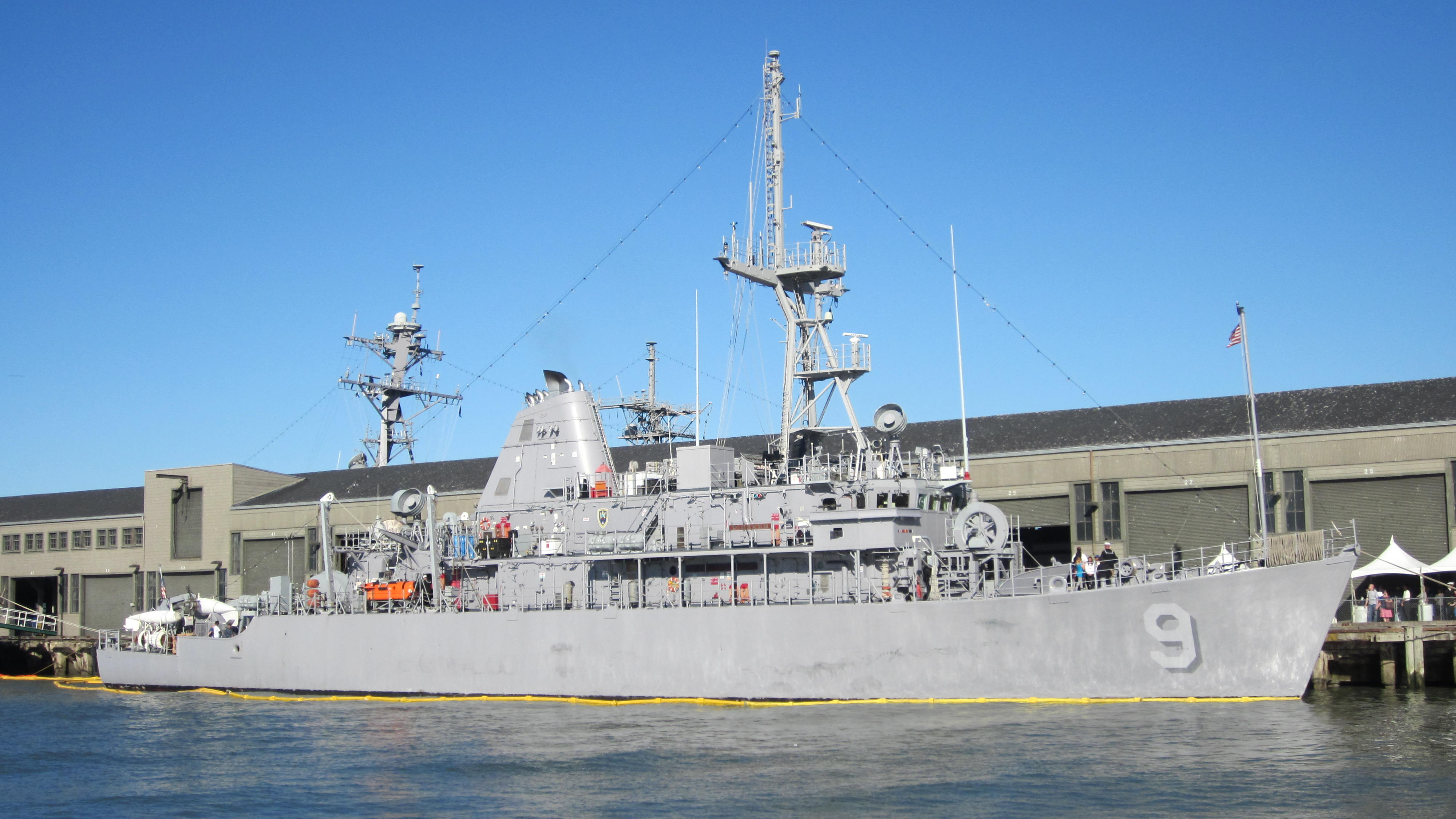 USS Pioneer (MCM-9) in San Francisco during Fleet Week.